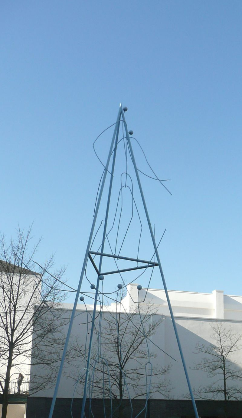 Figurenpyramide, Kleiner Warringtonplatz, W. Bitter